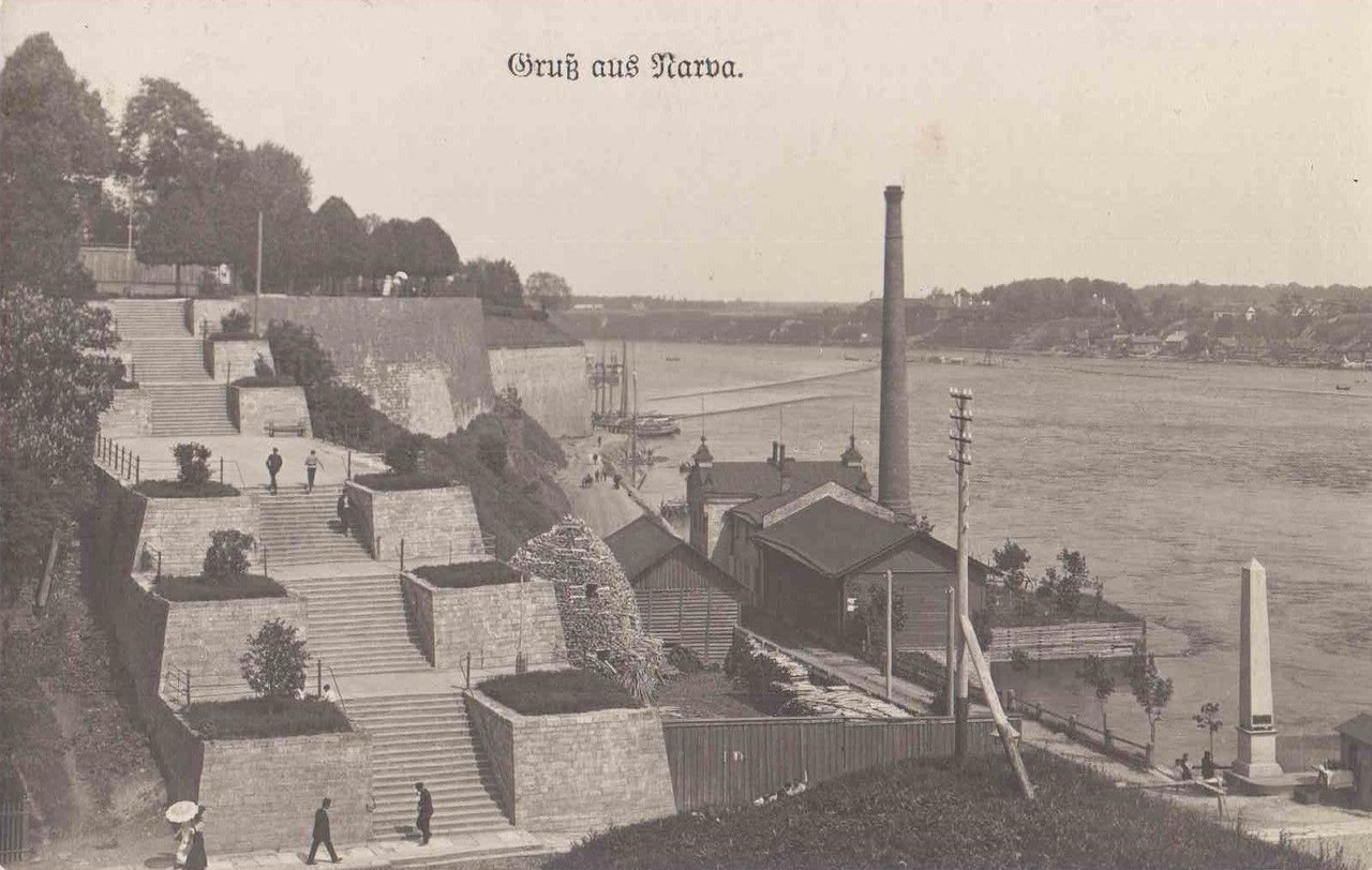 Hahni trepp Narvas